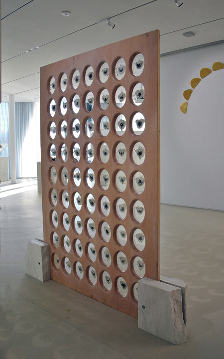 Médailles 2003-2016 Roses rouges fraîches plâtrées, marbre, verre, silicone, bois, vernis, pigment carmin, miroir, 209 x 163 cm Musée Jean Cocteau